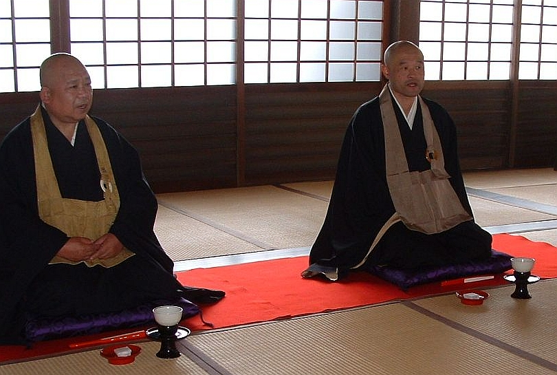 Two Rinzai-shu Roshi at Nanzenji